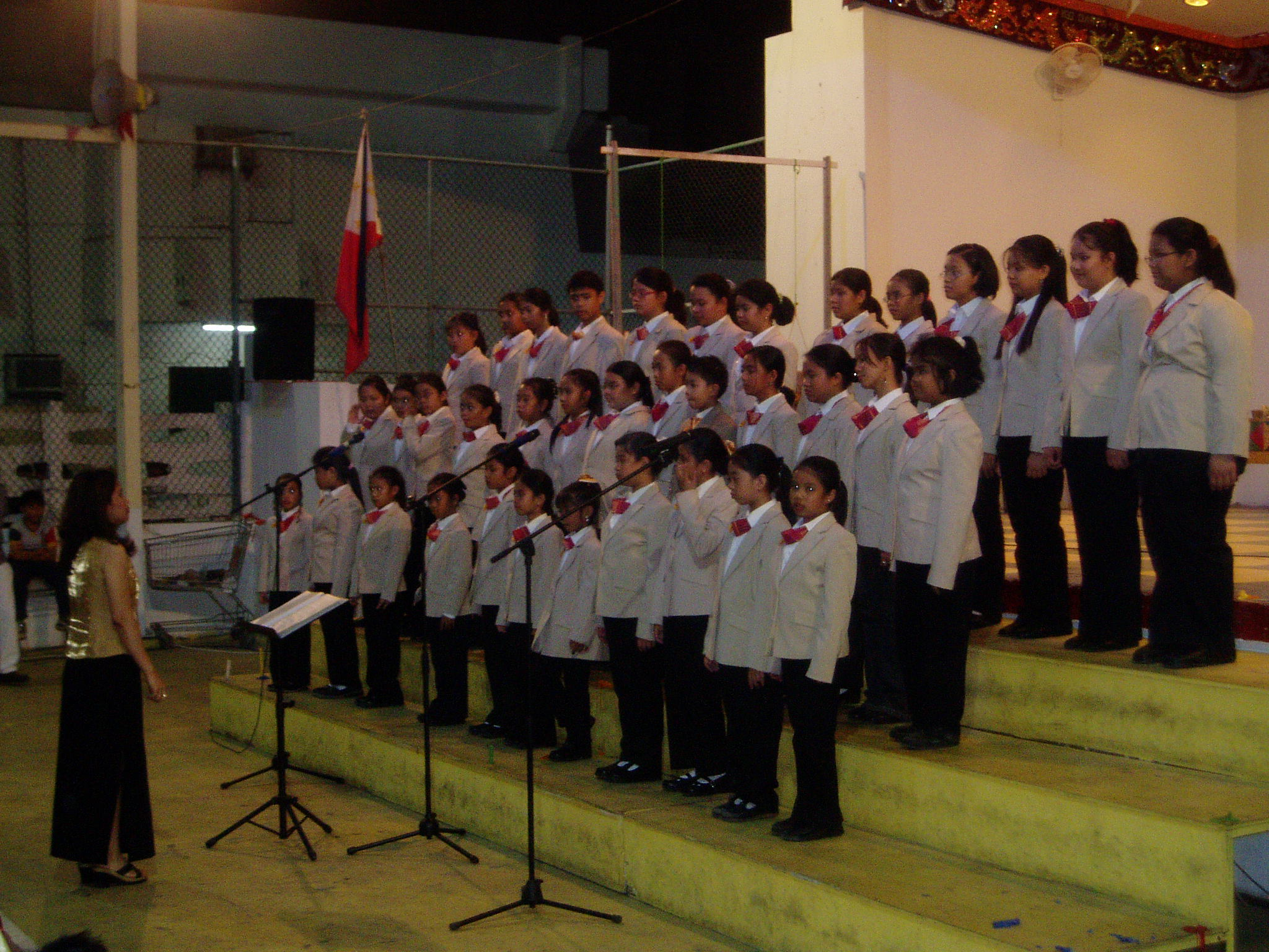 Tagalog: Performance ng SERENATA, Disyembre tl:2005, Komite ng SERENATA